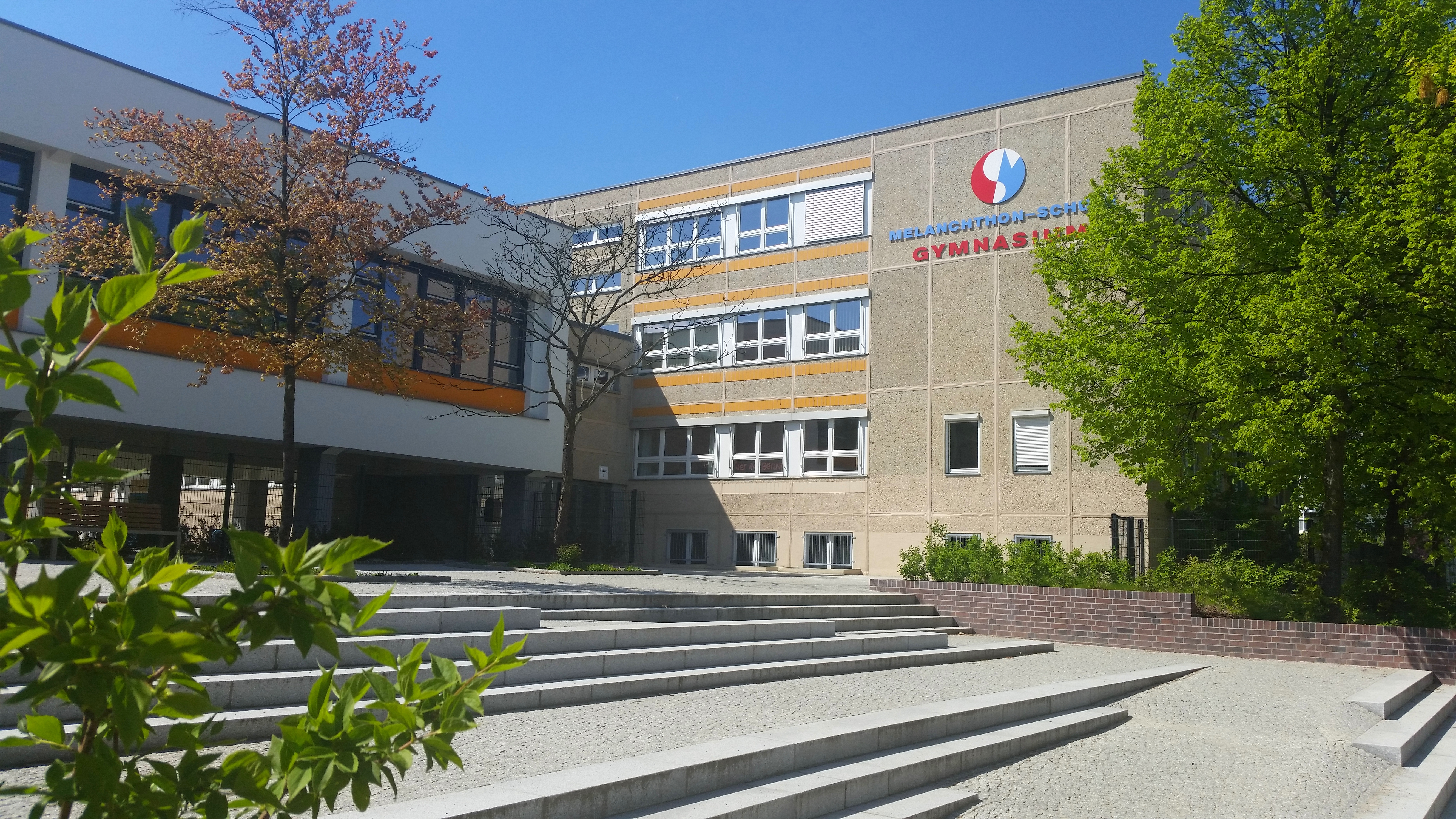 Haupteingang zum Haus 1 und zur Aula des Melanchthon-Gymnasiums im Berliner Bezirk Marzahn-Hellersdorf.